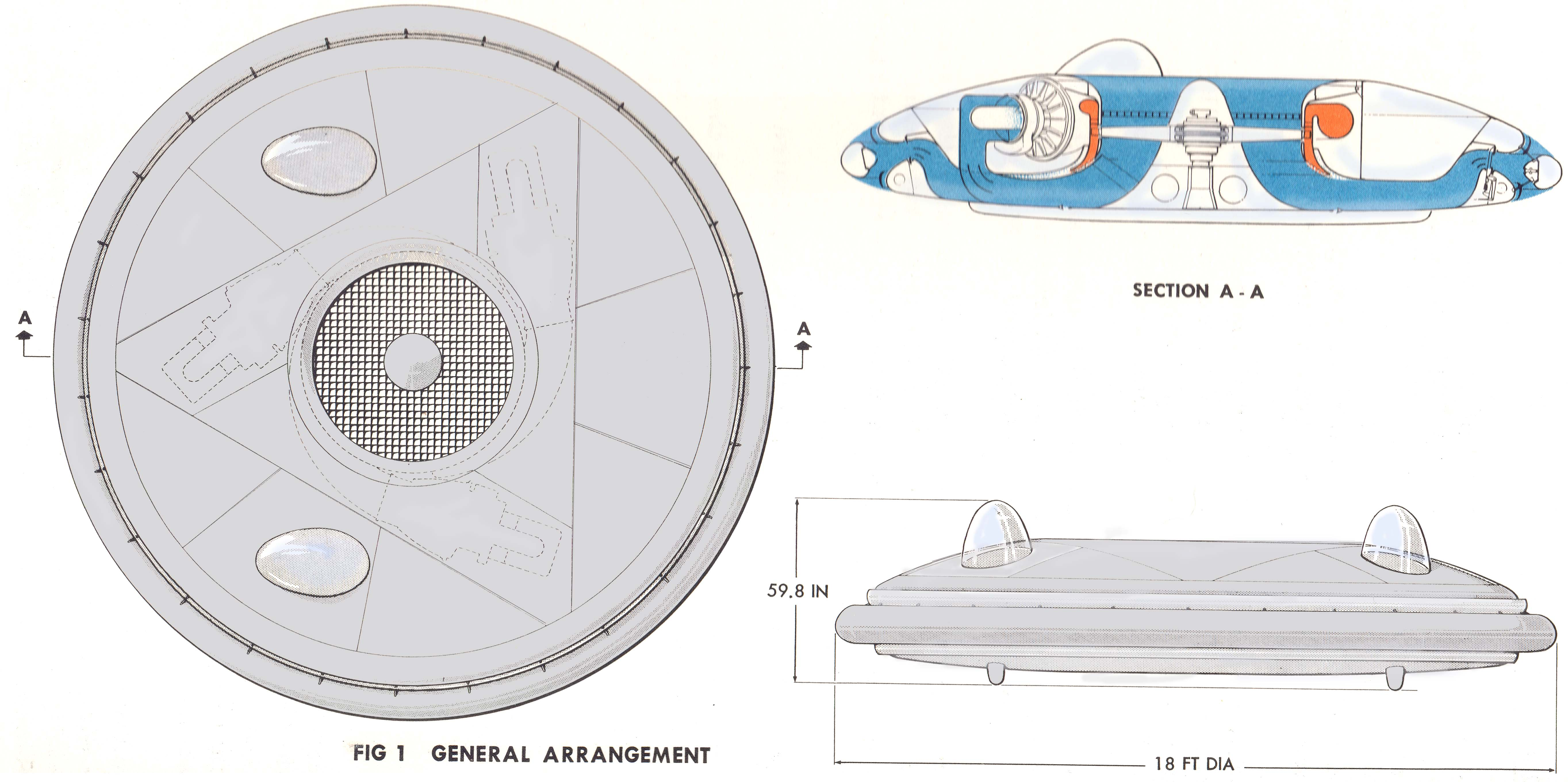 Avrocar 3-view